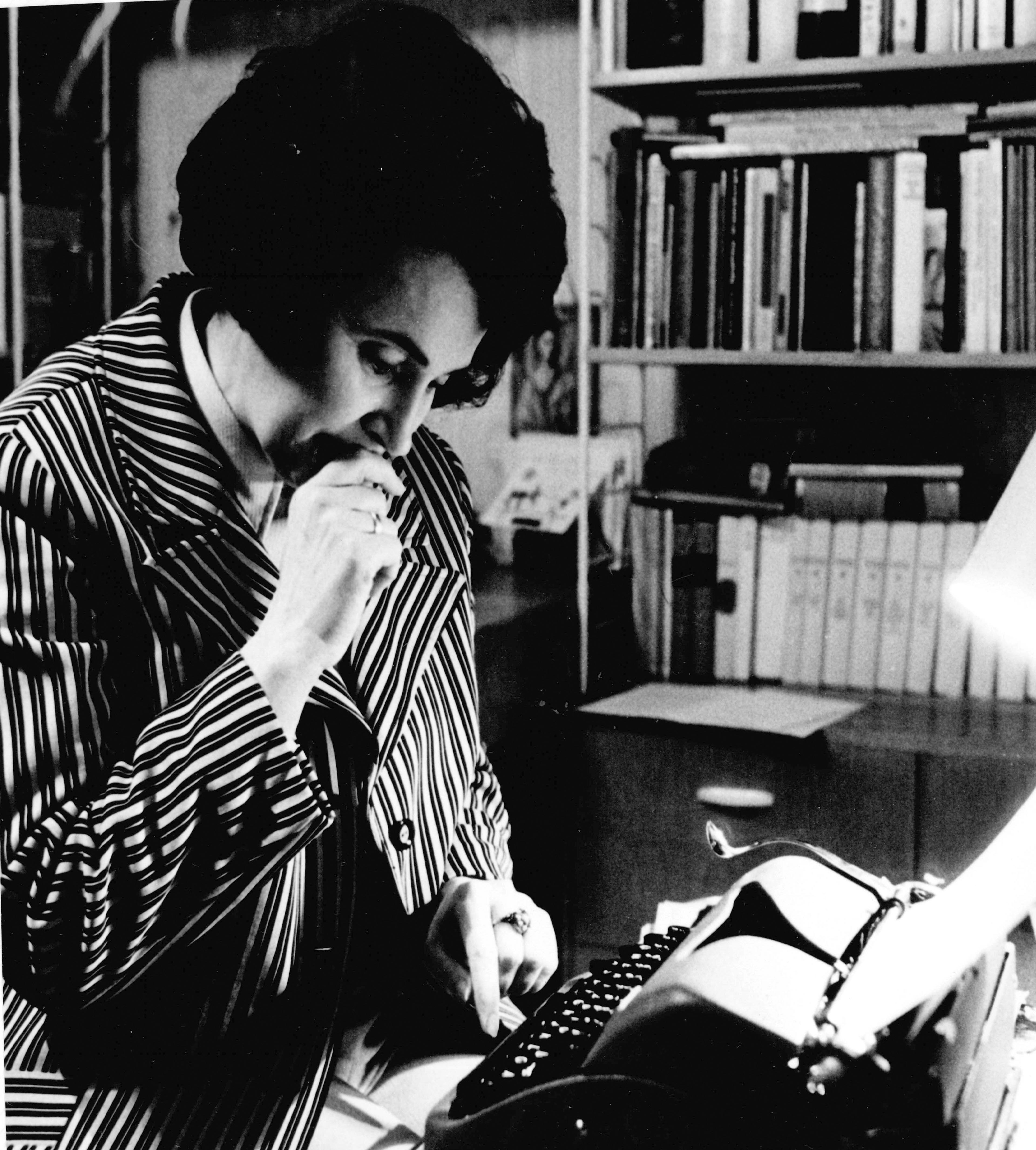 Gisela Heller beim typischen Schreiben auf ihrer Schreibmaschine ca. 1970